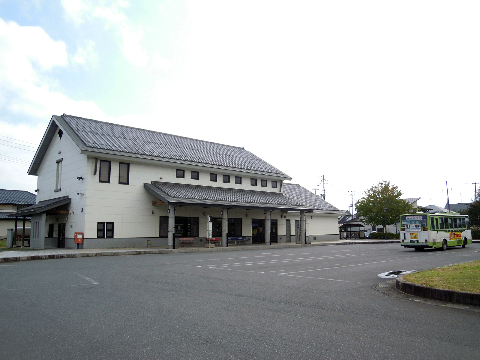 岩手県奥州市江刺区にある江刺バスセンターの外観